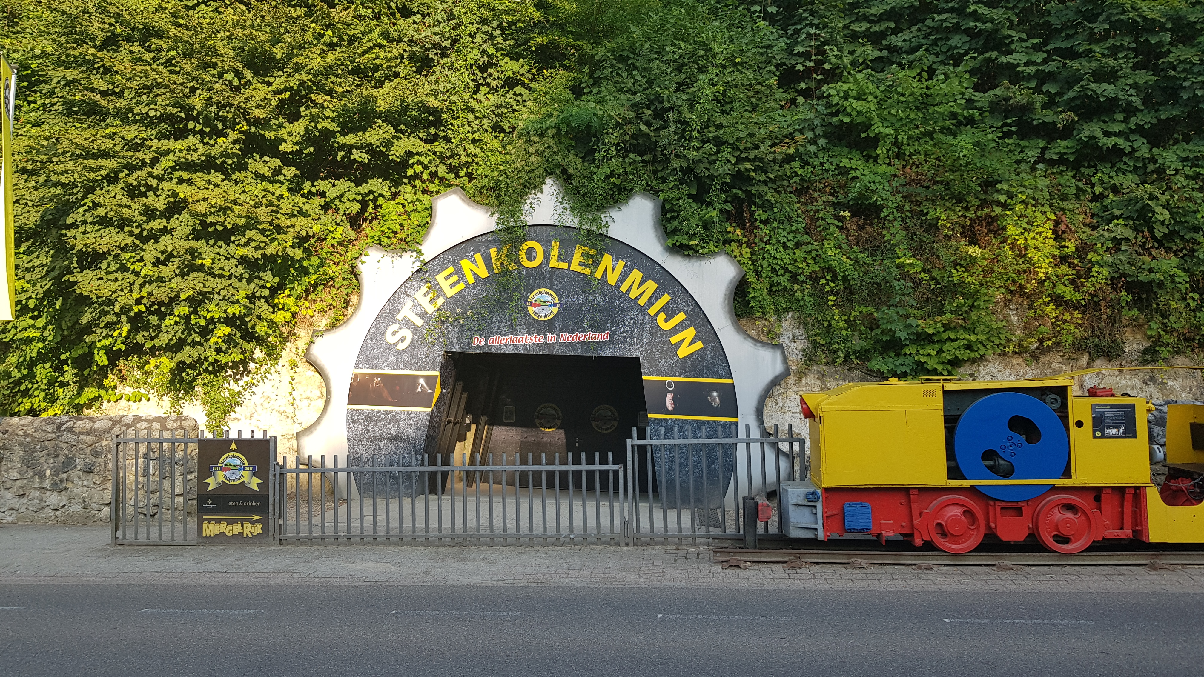 Museum Steenkolenmijn Valkenburg, Valkenburg aan de Geul, Nederland Wikidata has entry Q2445274 with data related to this item.